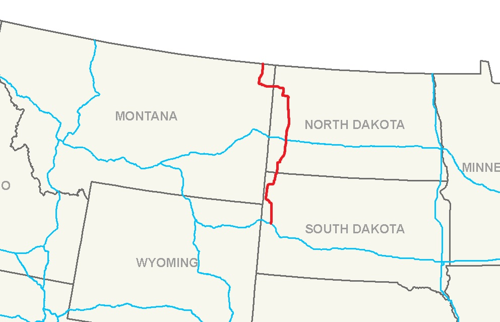 Gemaakt op basis van File:Interstate 5 map.png van Commons